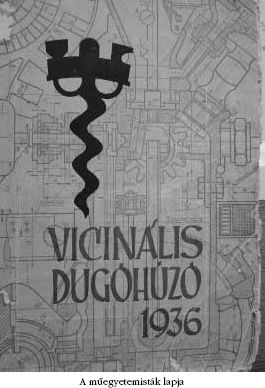 A Vicinális Dugóhúzó című újság előlapja 1936